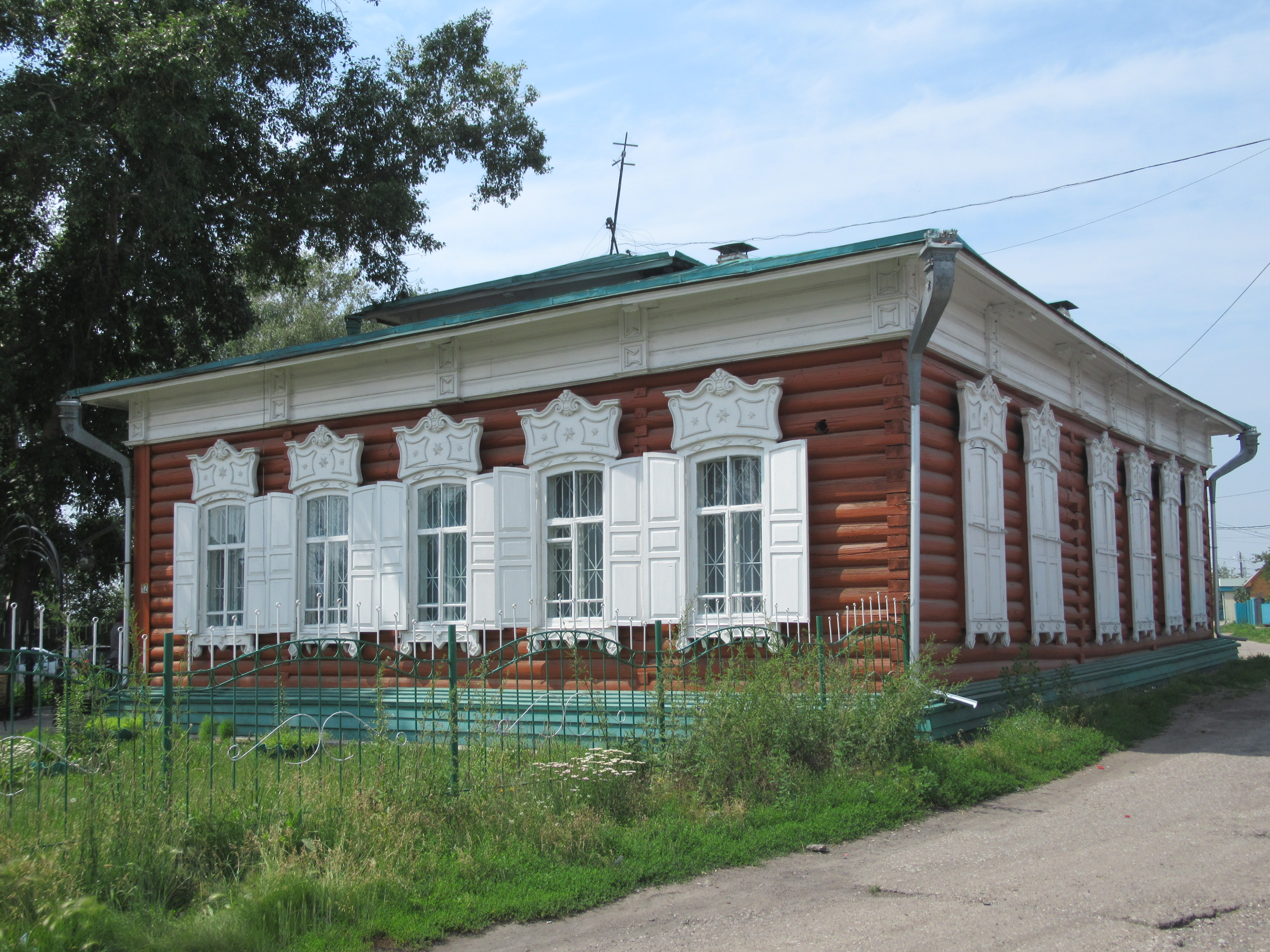 Дом с мезонином (дом Эйдельмана): улица Ленина, 12, Кабанск, Кабанский район, Бурятия